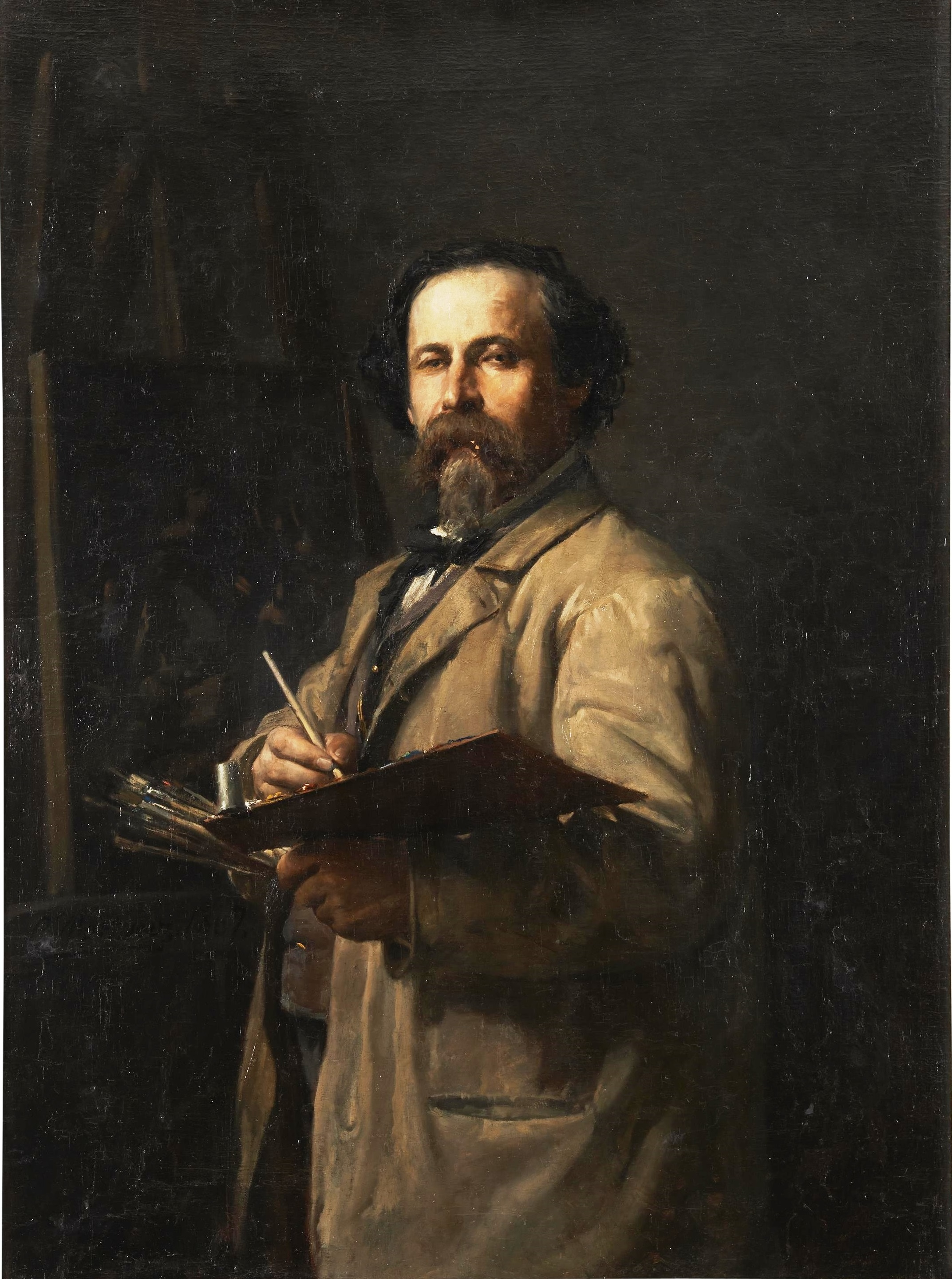 Retrato del pintor español Francisco Martínez Yago (1814-1895), ejecutado por su hijo, el pintor Salvador Martínez Cubells.